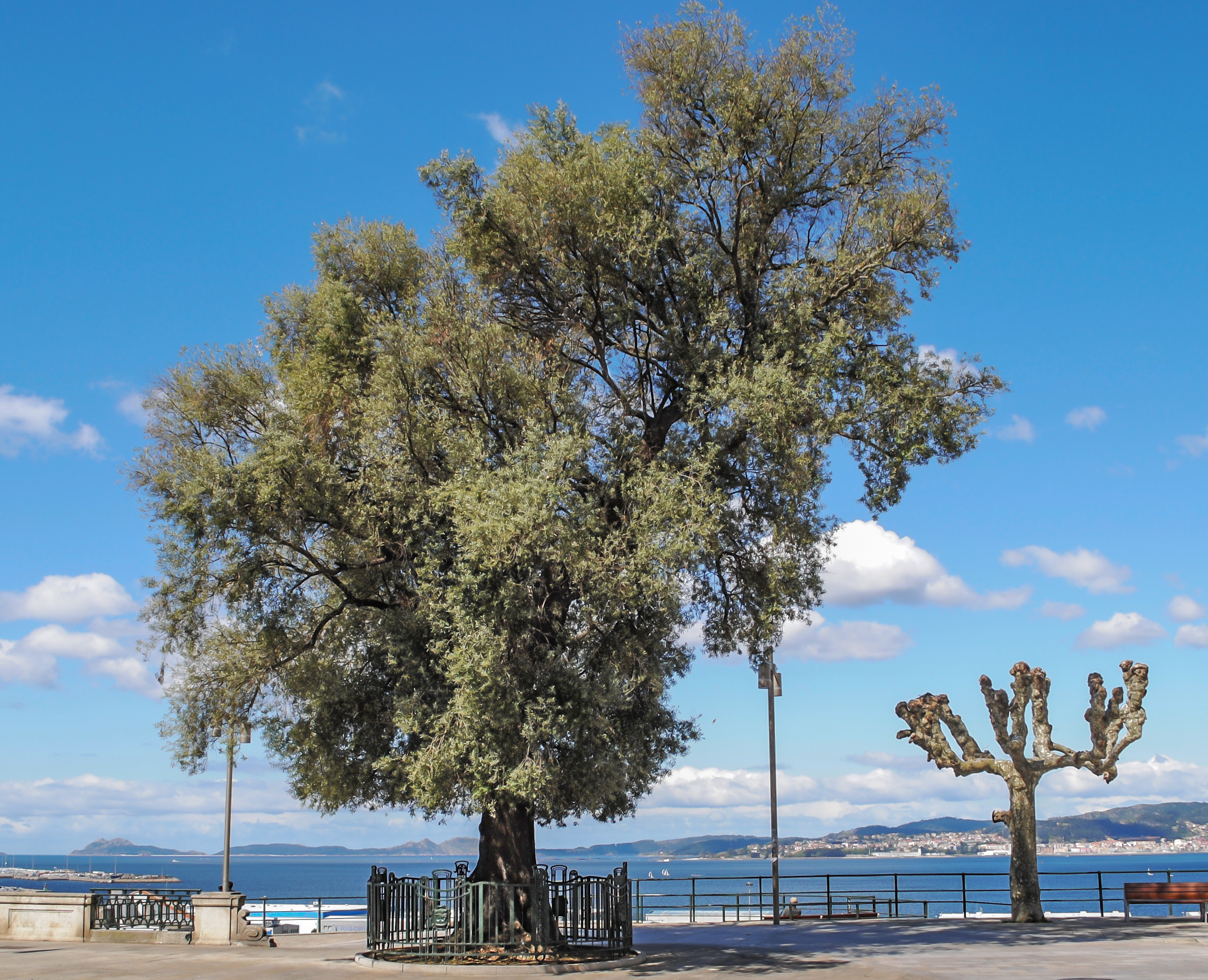 Oliveira, Vigo, Paseo de Alfonso XII